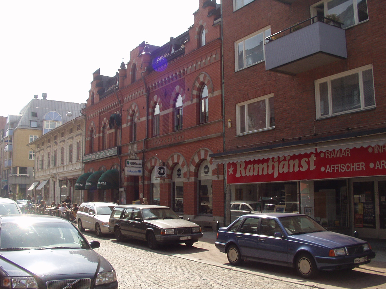 Beskrivning: Kv. Bore, Storgatan, Trollhättan Juli 2006 Fotograf: Kristian Persson (jag själv)